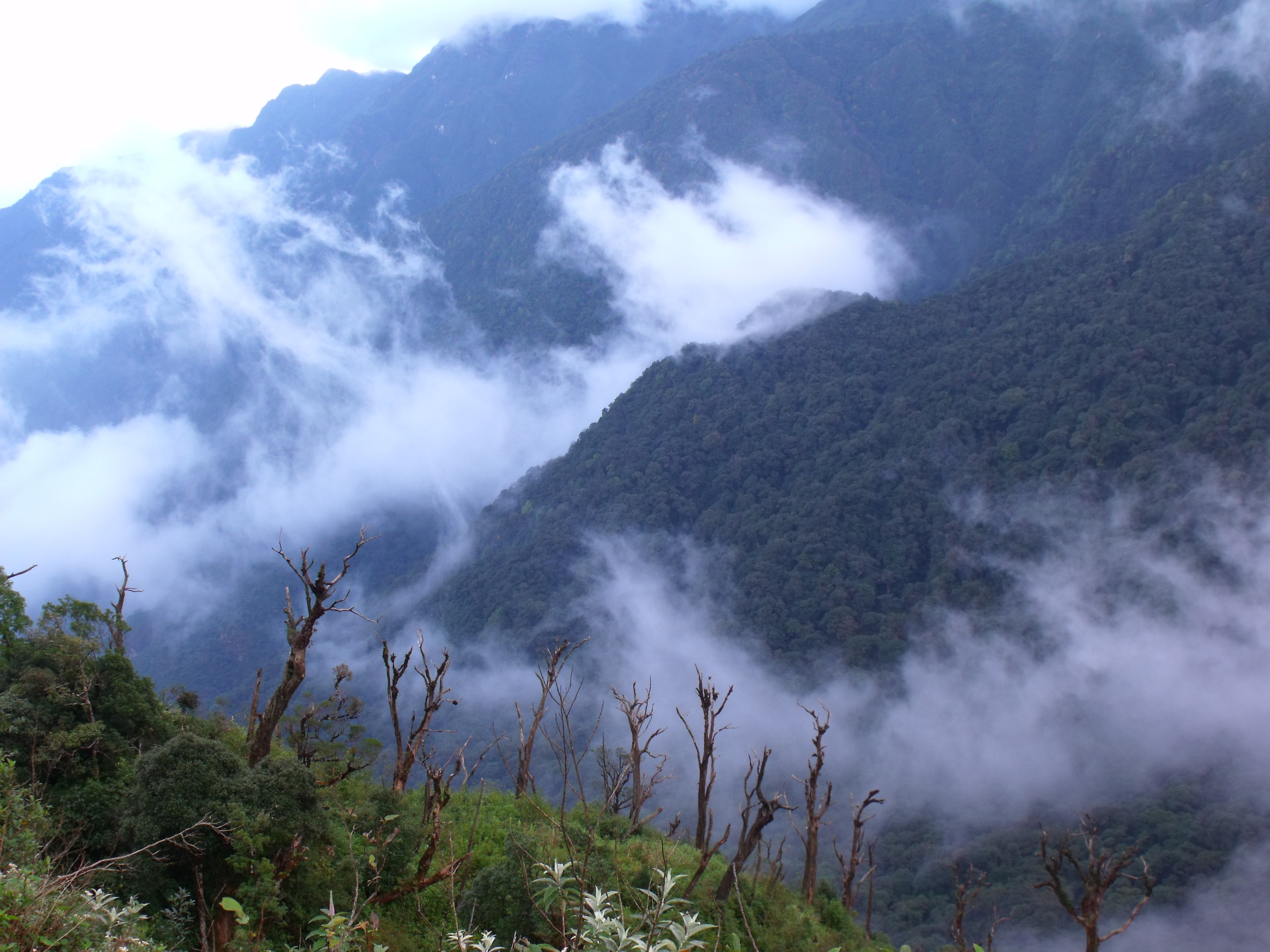 Một phần Rừng quốc gia Hoàng Liên nhìn từ tuyến đường leo núi từ Trạm Tôn lên đỉnh Fansipan